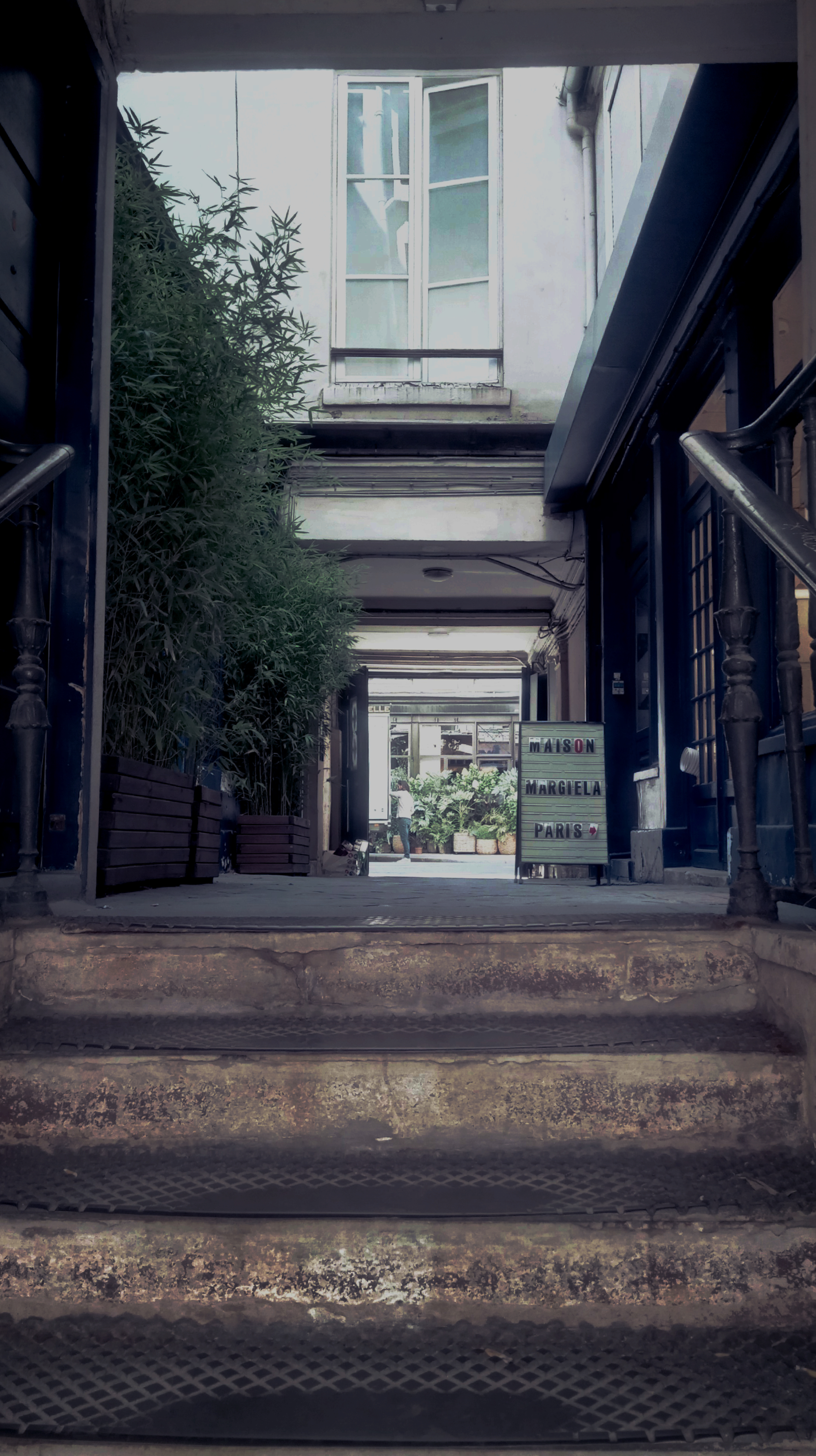 Passage Potier vu du coté 23 rue Montpensier